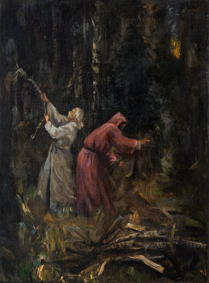 Картината „Калугери в гората“ от Господин Желязков